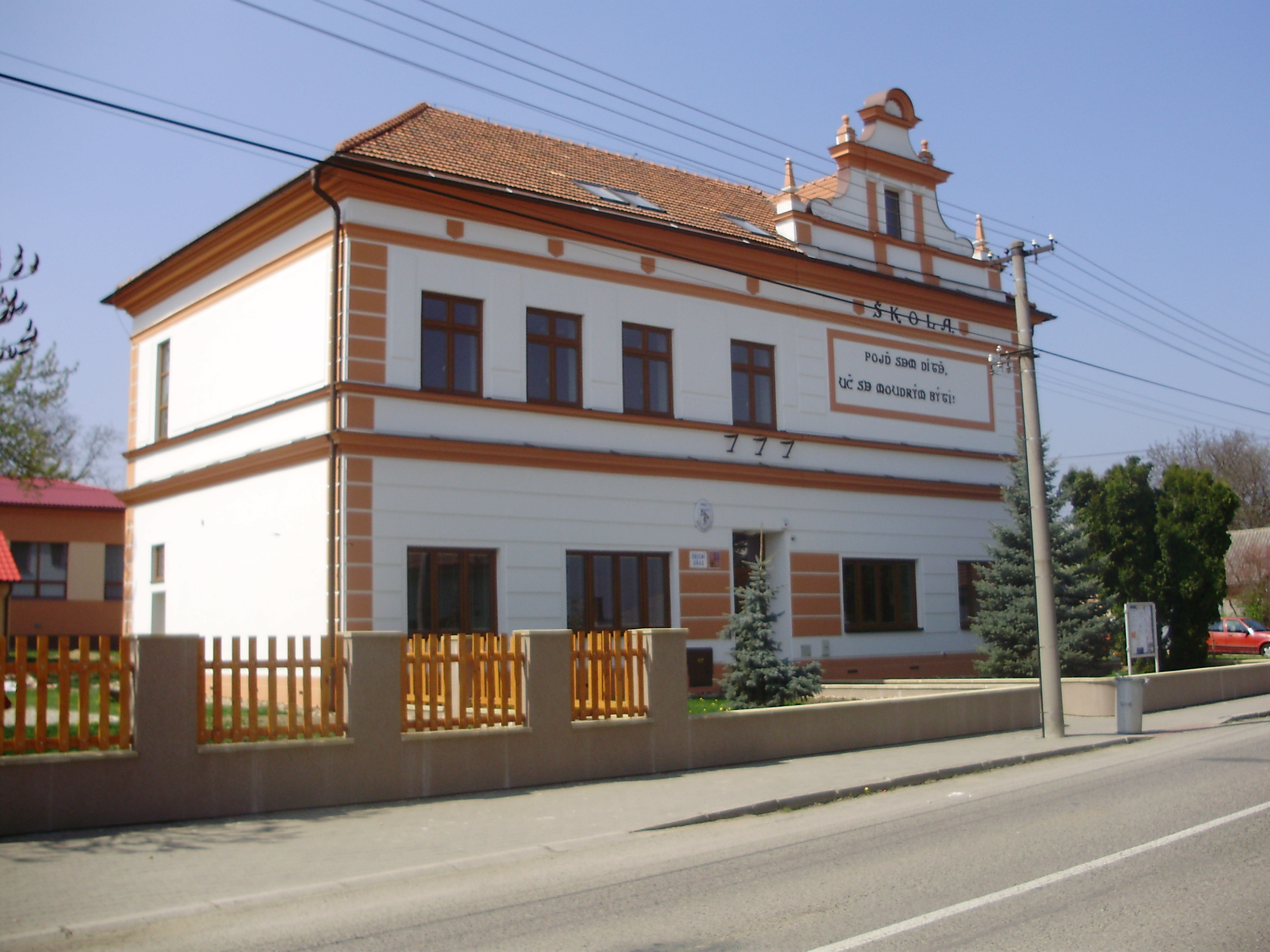 stará škola (dnes obecní úřad) Dětkovice